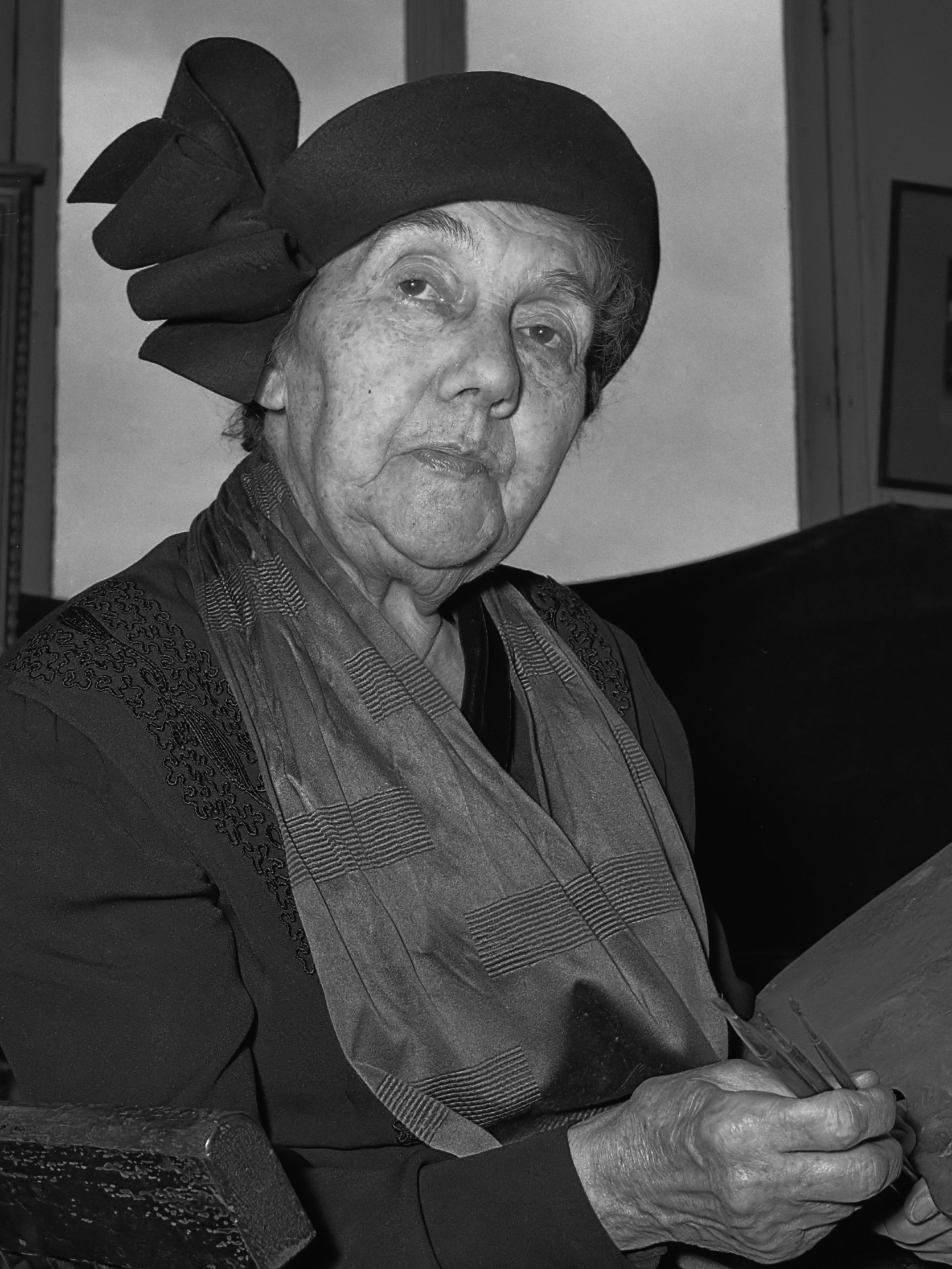 Coba Ritsema 80 jaar. Schilderes 22 juni 1956